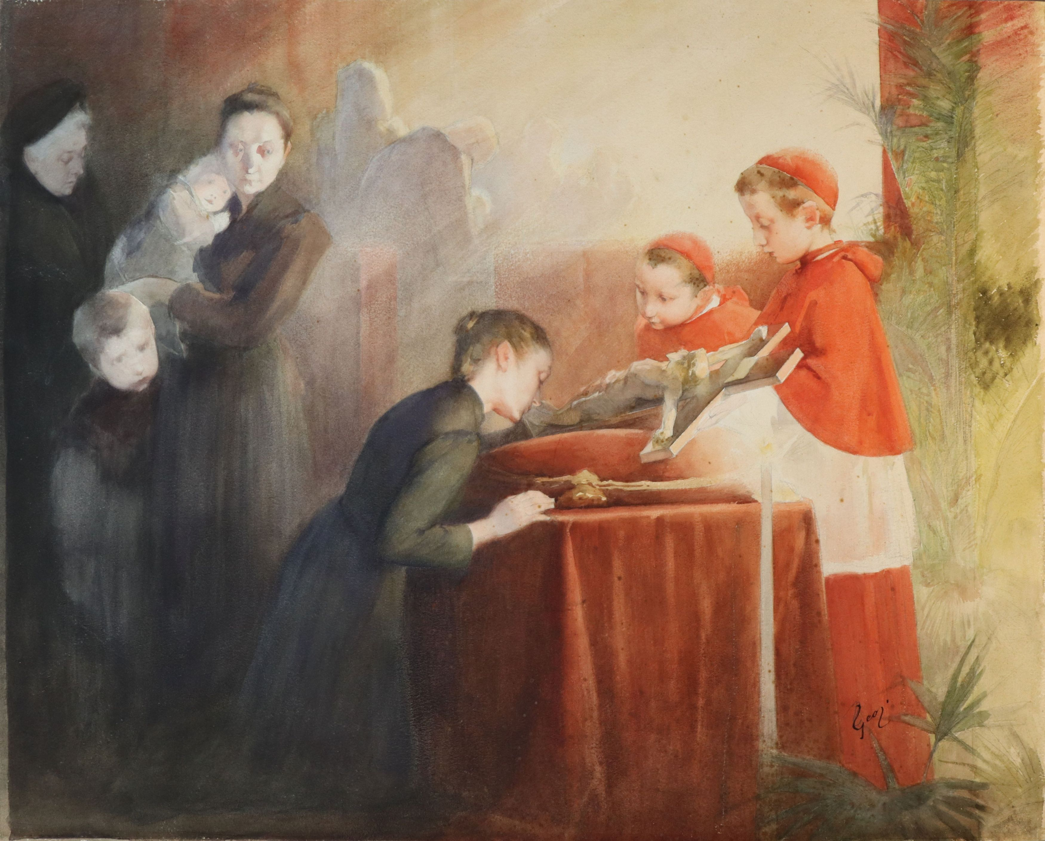 Tableau présenté à l'Exposition de la Société des aquarellistes à Paris en 1902. Collection particulière. Dimensions 81 x 65 cm. Représente l'adoration de la croix, partie de la liturgie catholique du Vendredi saint. Geoffroy a representé la même famille en 1901 dans son tableau Les Résignés (Musée d'Orsay)